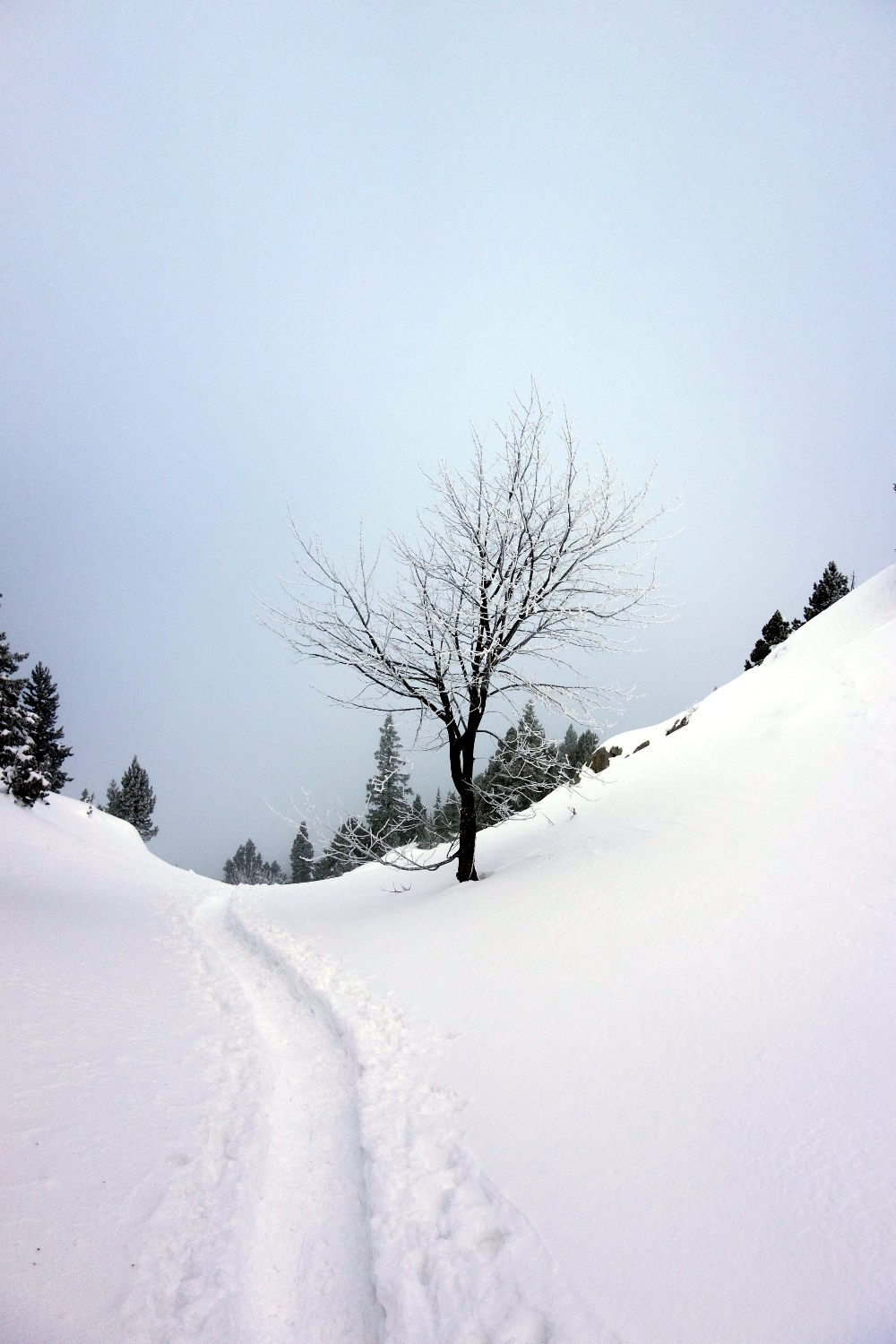 Vercors nord